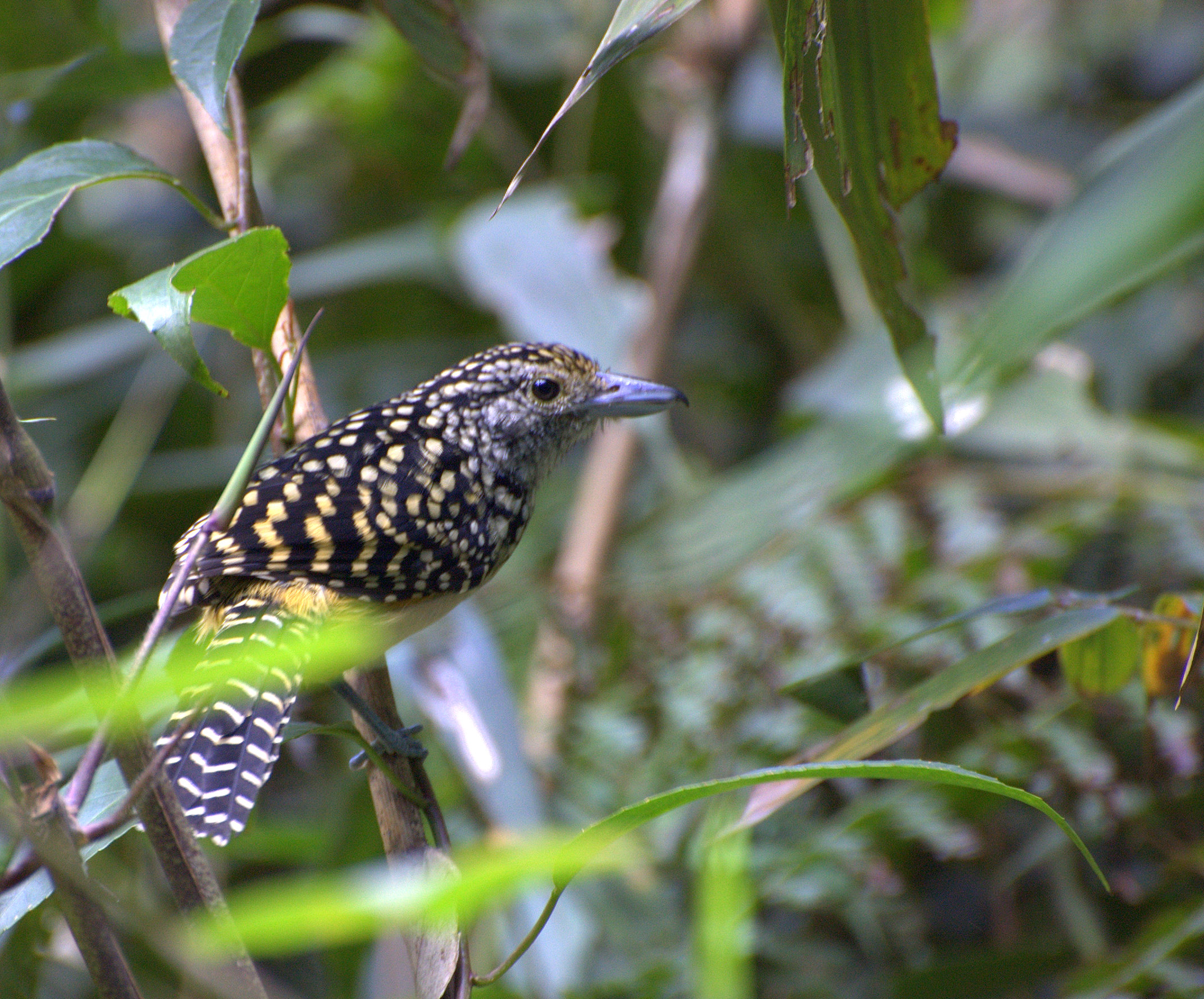 Spot-backed Antshrike CHOCÃO-CARIJÓ (Hypoedaleus guttatus) Parque Estadual da Serra da Cantareira - São Paulo-SP